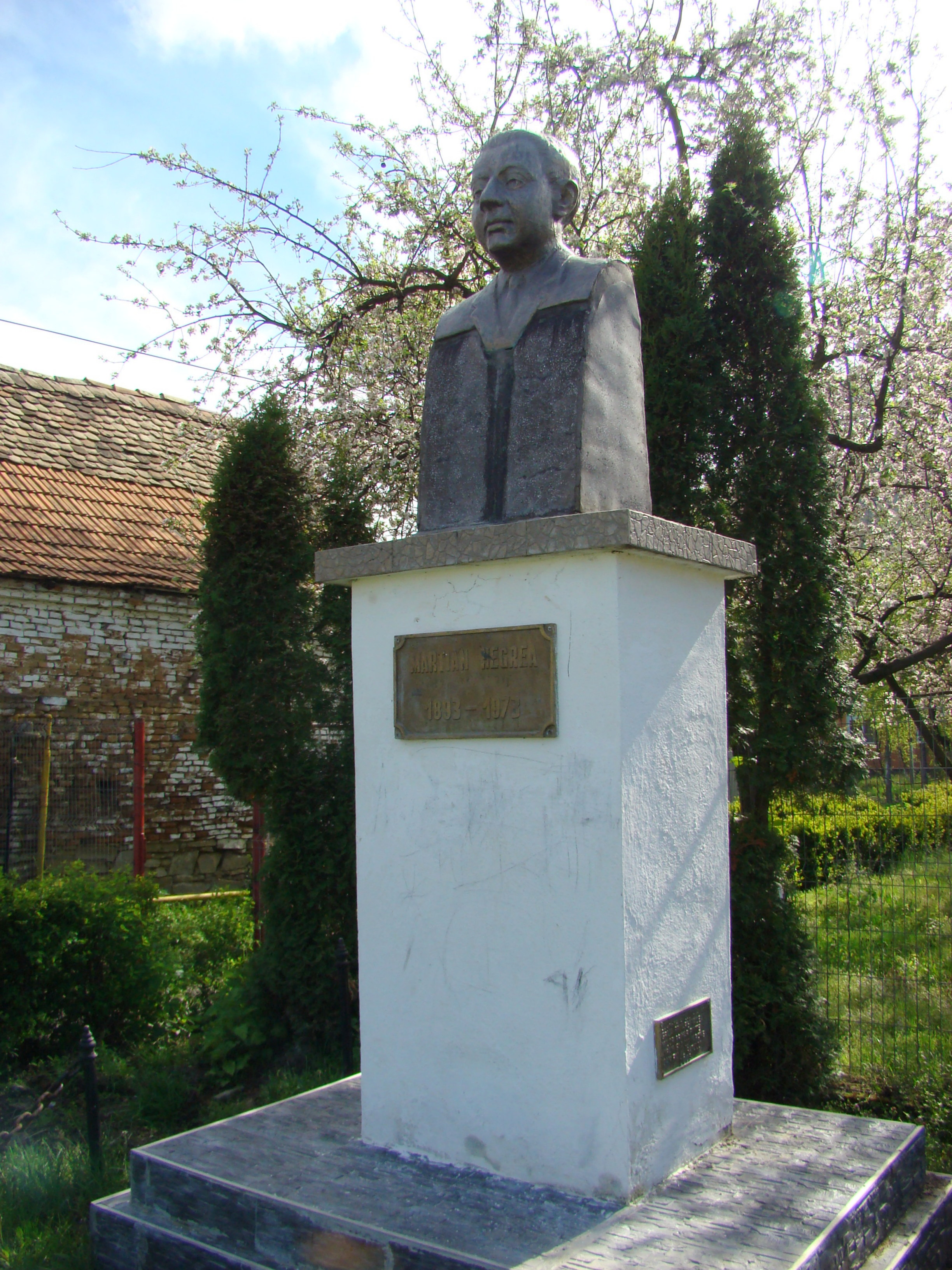 Bustul compozitorului Marțian Negrea din Valea Viilor, județul Sibiu